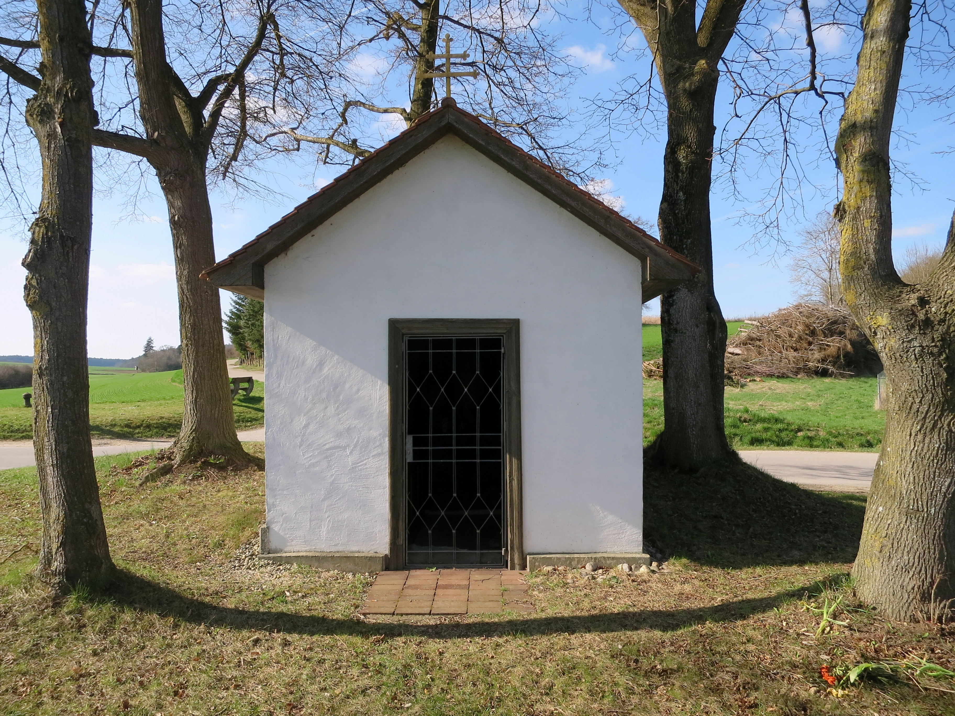 Eine kleine Wegkapelle direkt neben der Autobahn mit Lourdesmadonna.